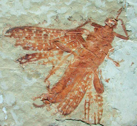 Susumaniid stick insect Renphasma sinica gen. et sp. nov., holotype A31857, Beipiao City, China, Lower Cretaceous, Yixian Formation.